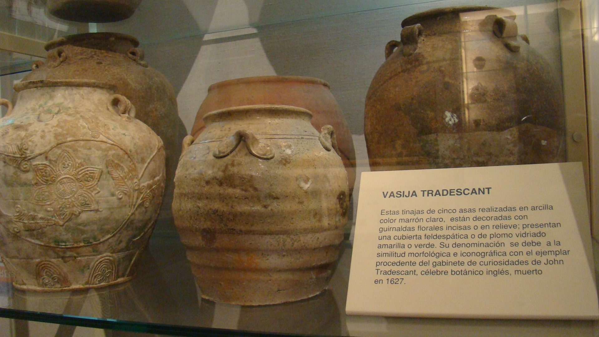 Museo Naval de Madrid, España.